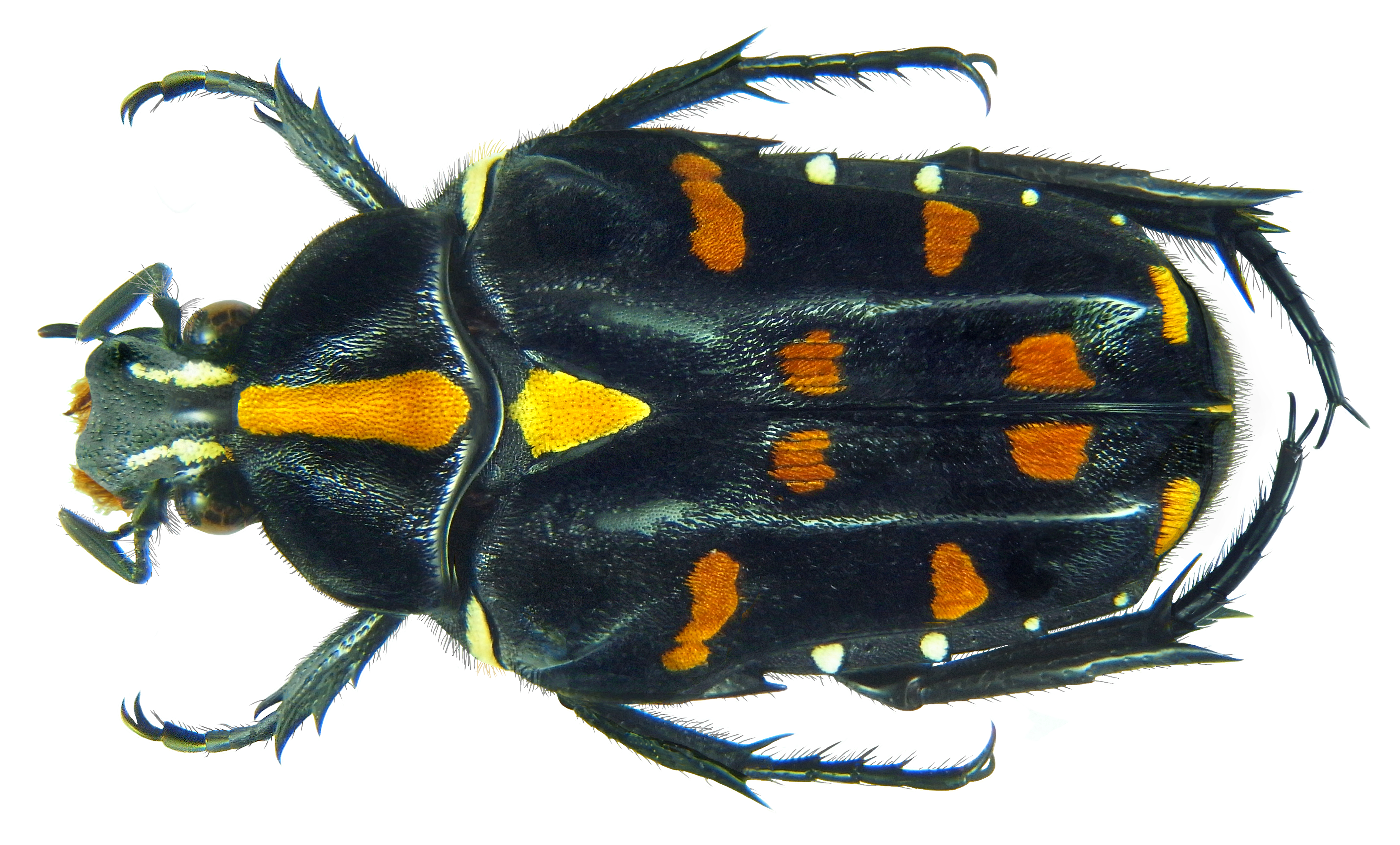 Familie: Scarabaeidae Groesse: 21 mm (17,6-21,6 mm) Verbreitung: Sulawesi Fundort: Indoensien, Sulawesi, Palu leg. local collectors, 4.IX.2002; det. U.Schmidt, 2013 Photo: U.Schmidt, 2013